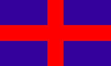 Flagge Oldenburgs von 1774 bis 1871 und von 1921 bis 1935. Siehe auch: [1]